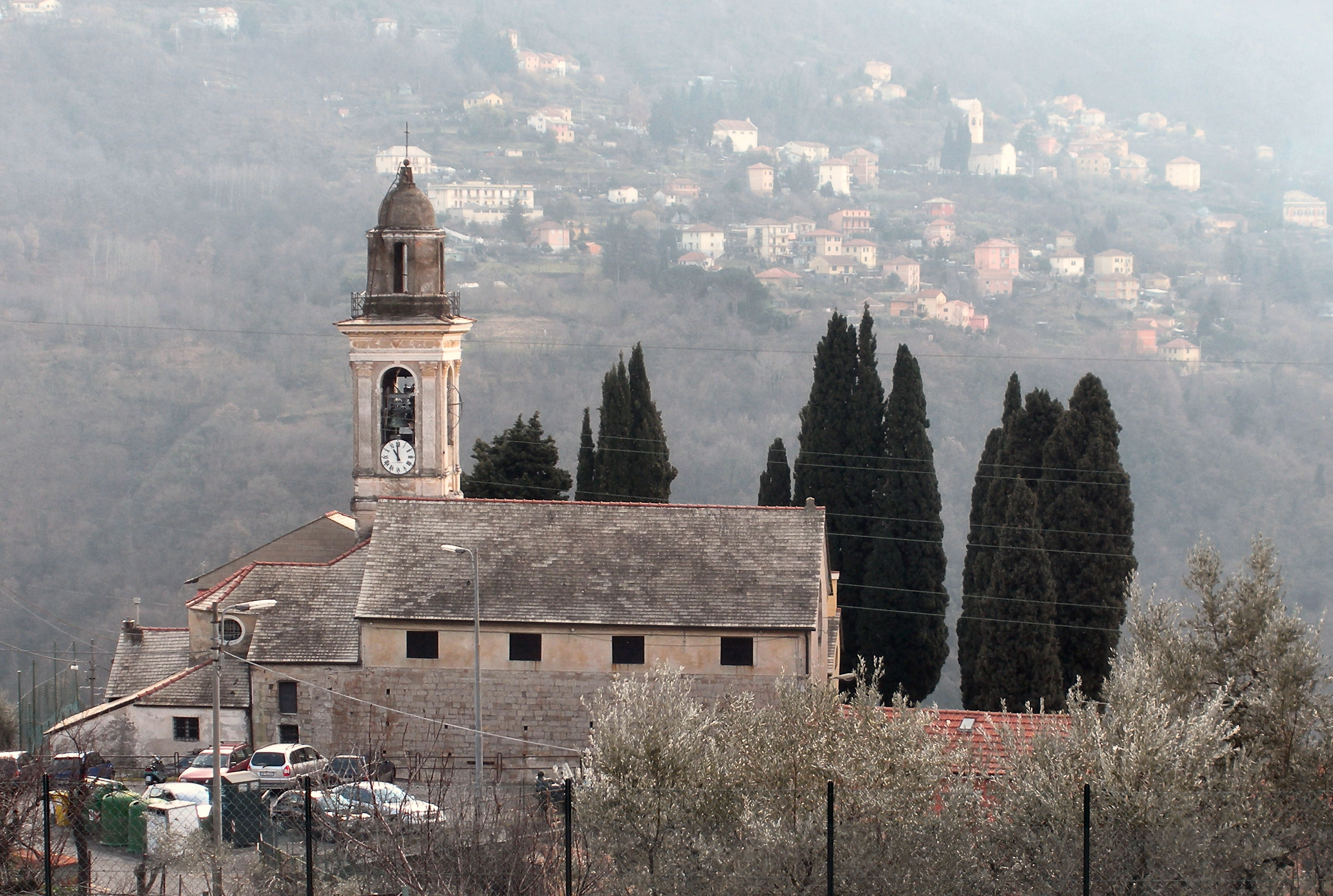 La chiesa di San Cosimo di Struppa (Genova)